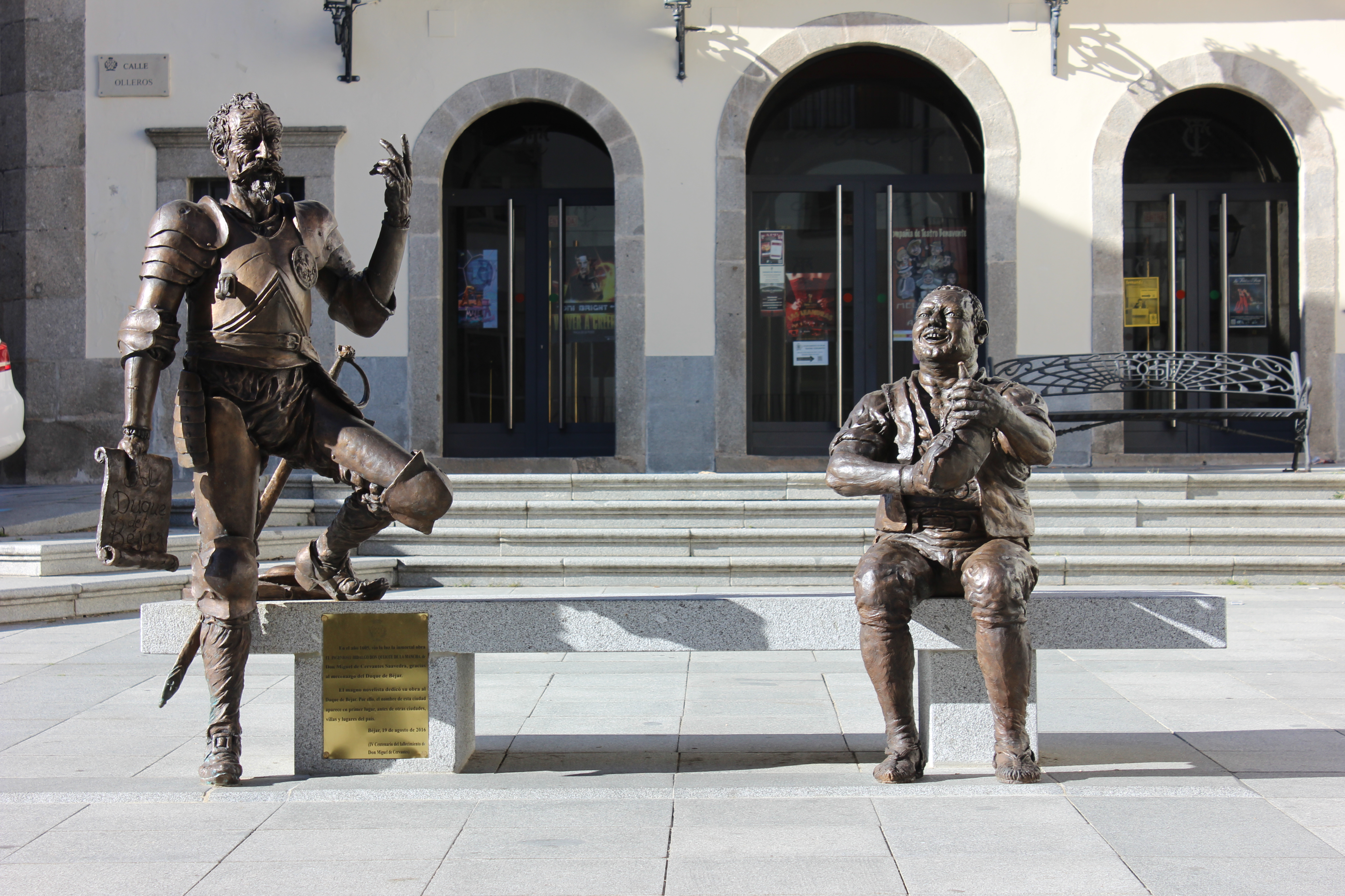 تمثالا كل من دون كيخوتي وسانشو بانثا في مدينة بيخار الإسبانية.